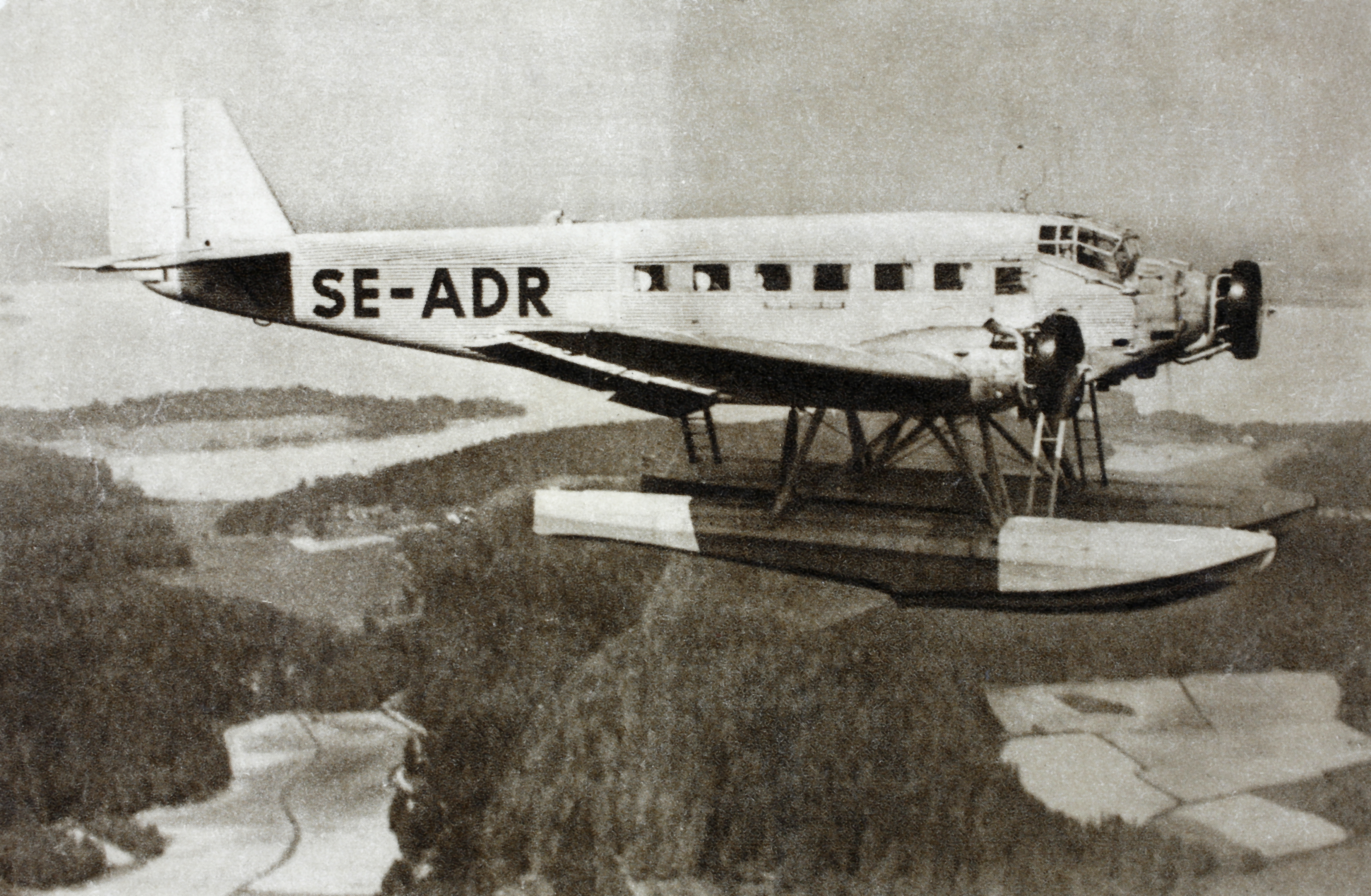 Junker Ju 52, Södermanland SE-ADR